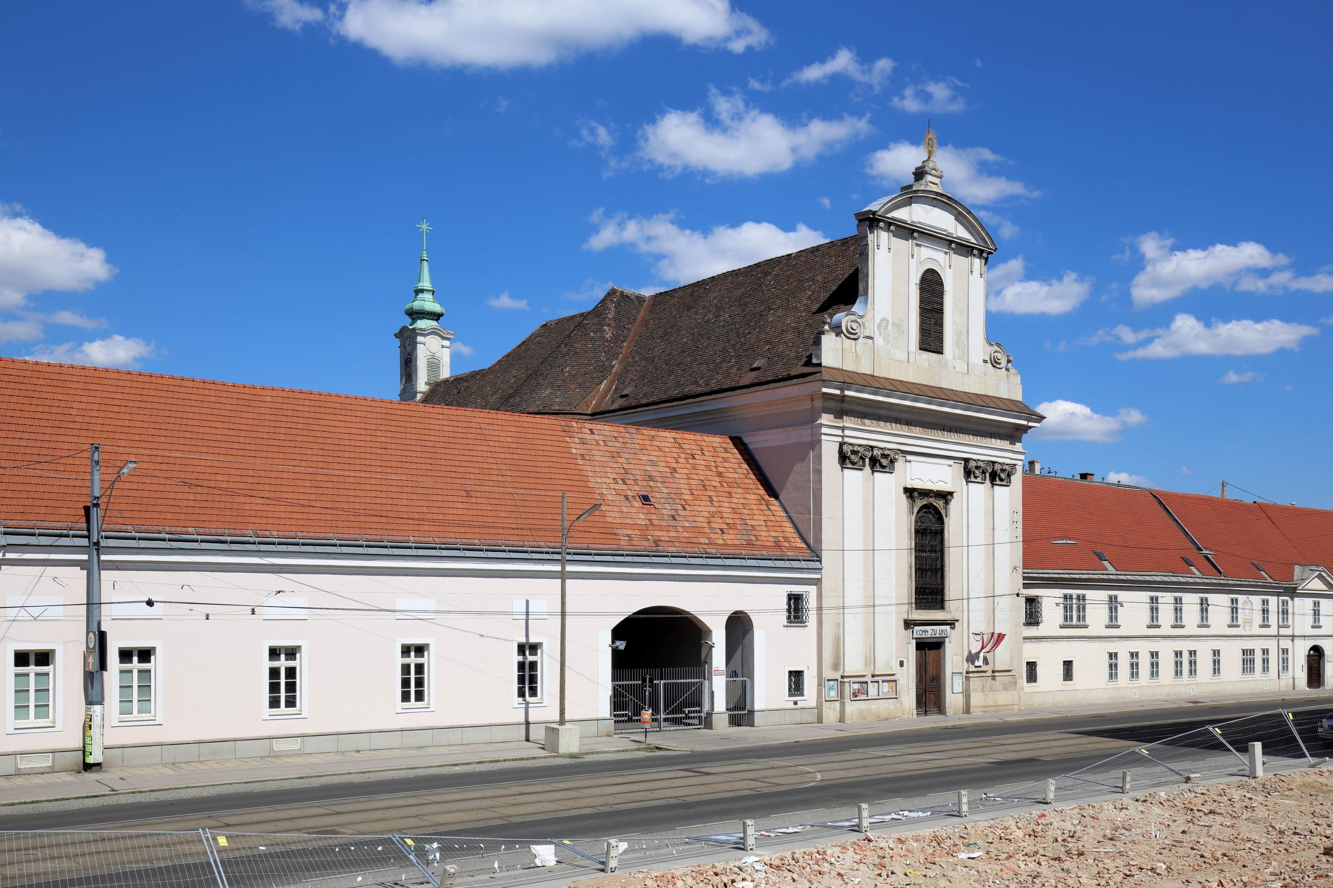 Das ehmalige Waisenhaus am Rennweg mit der röm.-kath. Pfarrkirche Mariä Geburt im 3. Wiener Gemeindebezirk Landstraße.Ab 1745 errichtet. 1785 wurde das Waisenhaus auf den Alsergrund verlegt und die Bauten zu einer Artilleriekaserne adaptiert.